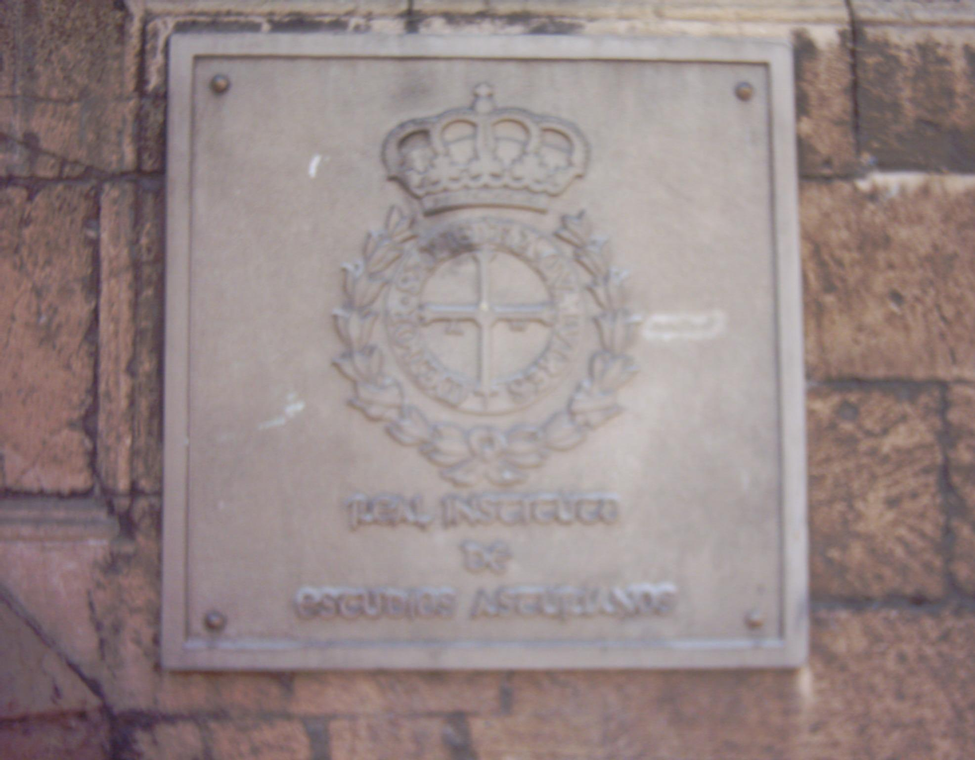 Placa situada a la entrada del RIDEA, Real Instituto de Estudios Asturianos.